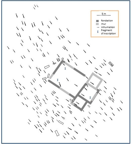 Plan de la nécropole des Plantées, commune de Briord à l'époque de l'antiquité tardive. Tombes et église paleochrétienne